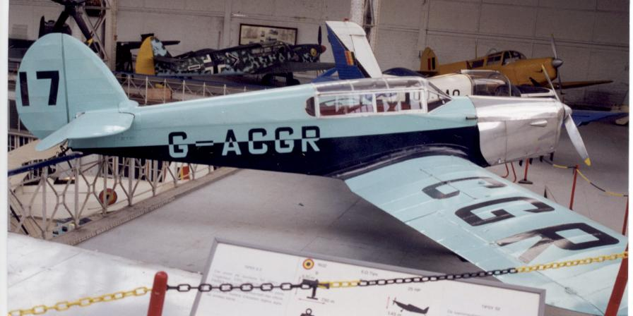 Percival D.2 Gull Four at Brussels Museum